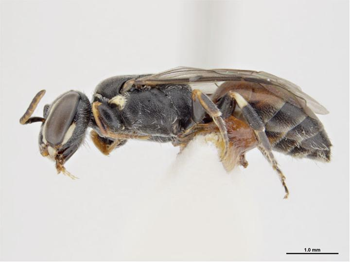 Hylaeus sanguinipictus female